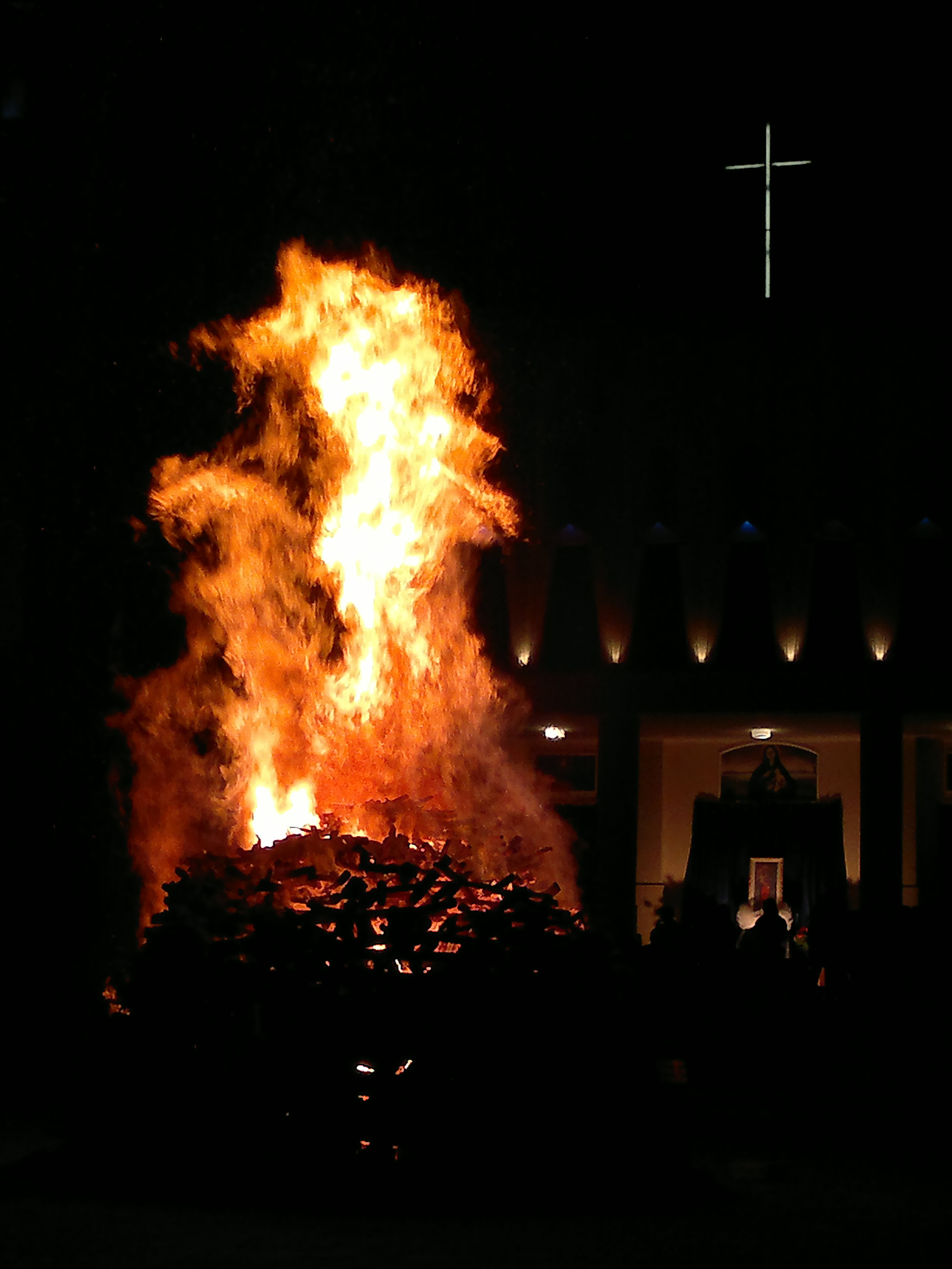 Focaraccio at the Avezzano's quarter of Madonna del Passo, Italy